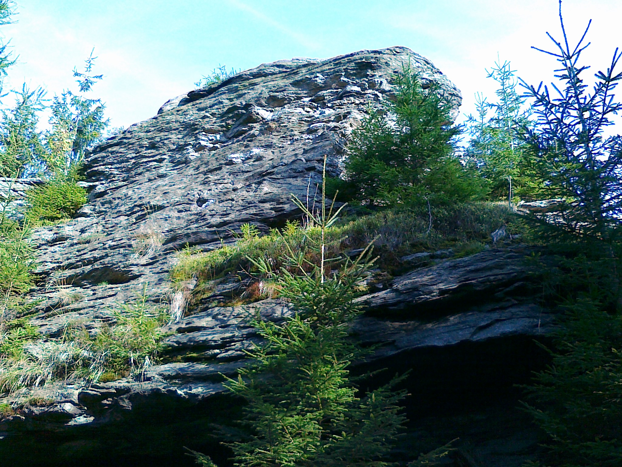 Skalisko szczytowe o nazwie Žárový vrch-SV - 1043 m n.p.m.